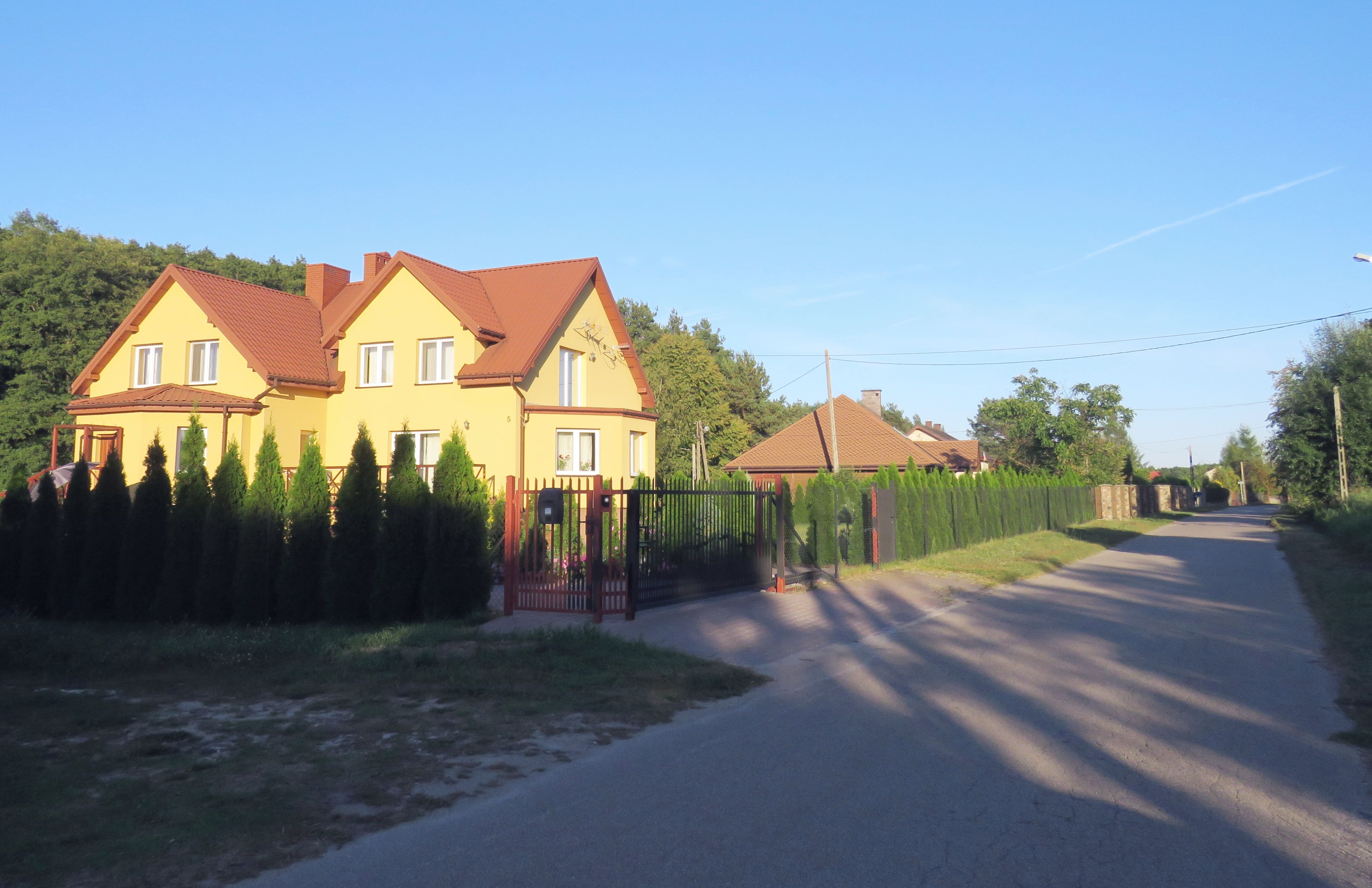 Kępiaste